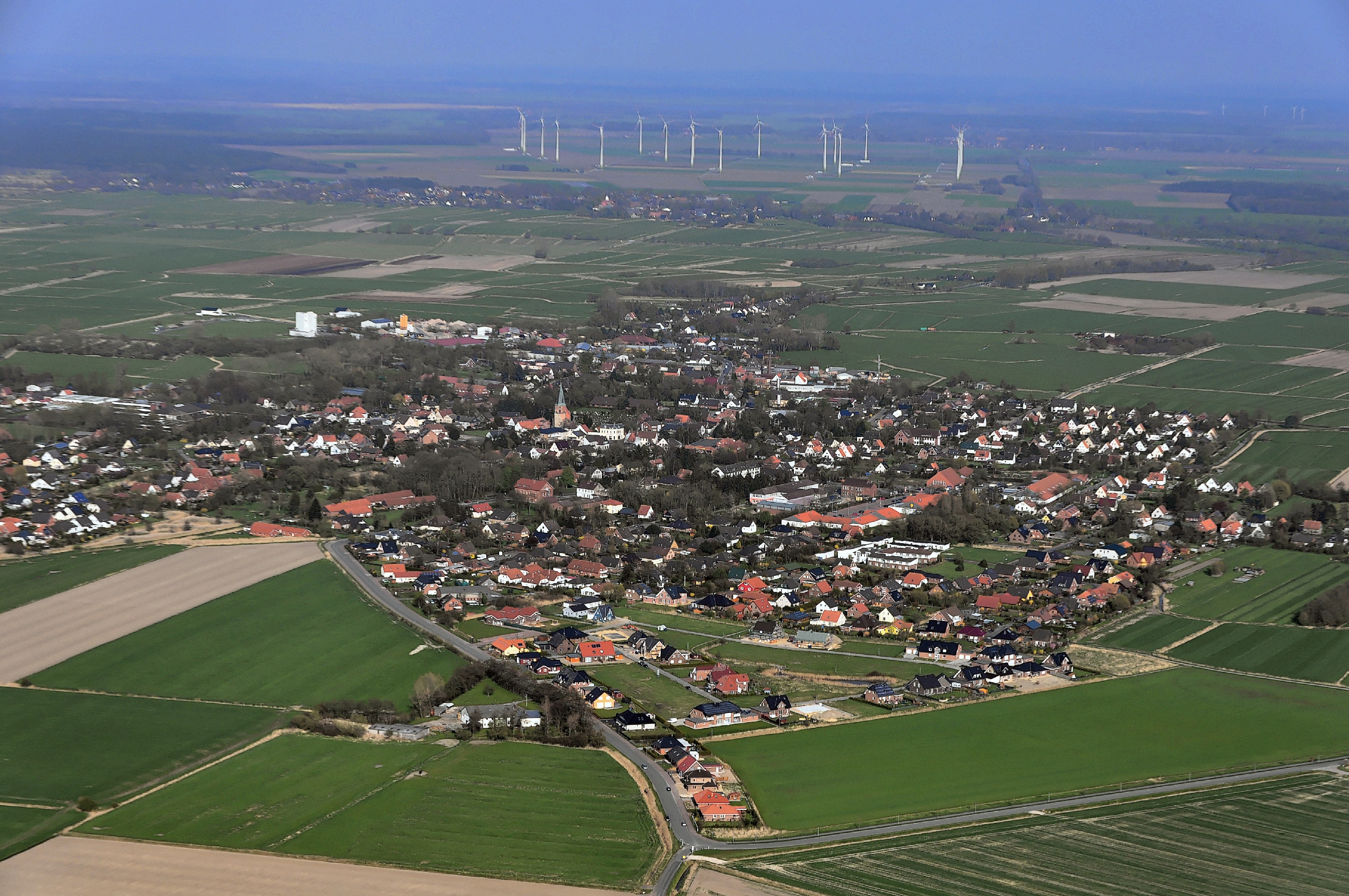 Luftbilder von der Nordseeküste 2013-05